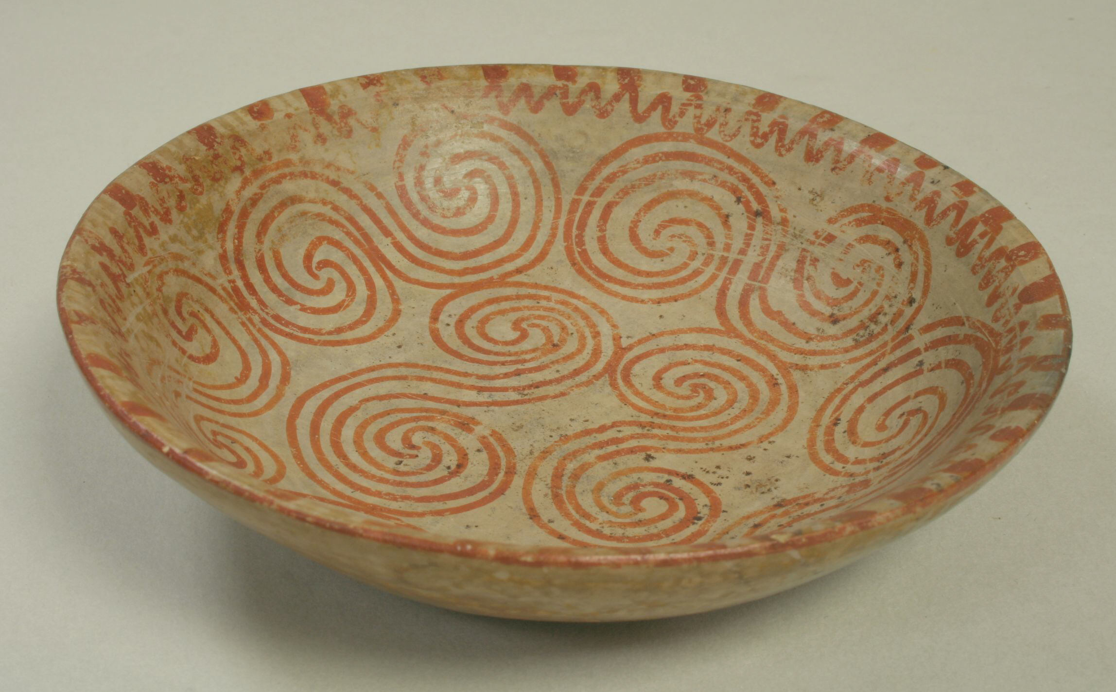 Cajamarca; Bowl; Ceramics-Containers